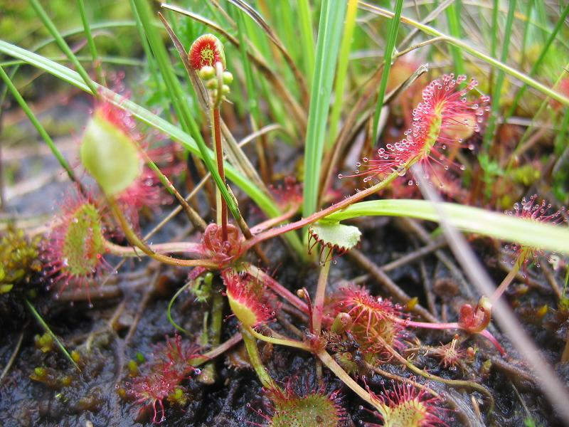 Drosera rotundifolia, petite plante carnivore dans une tourbière acide du secteur Prabouré. Espèce protégée.